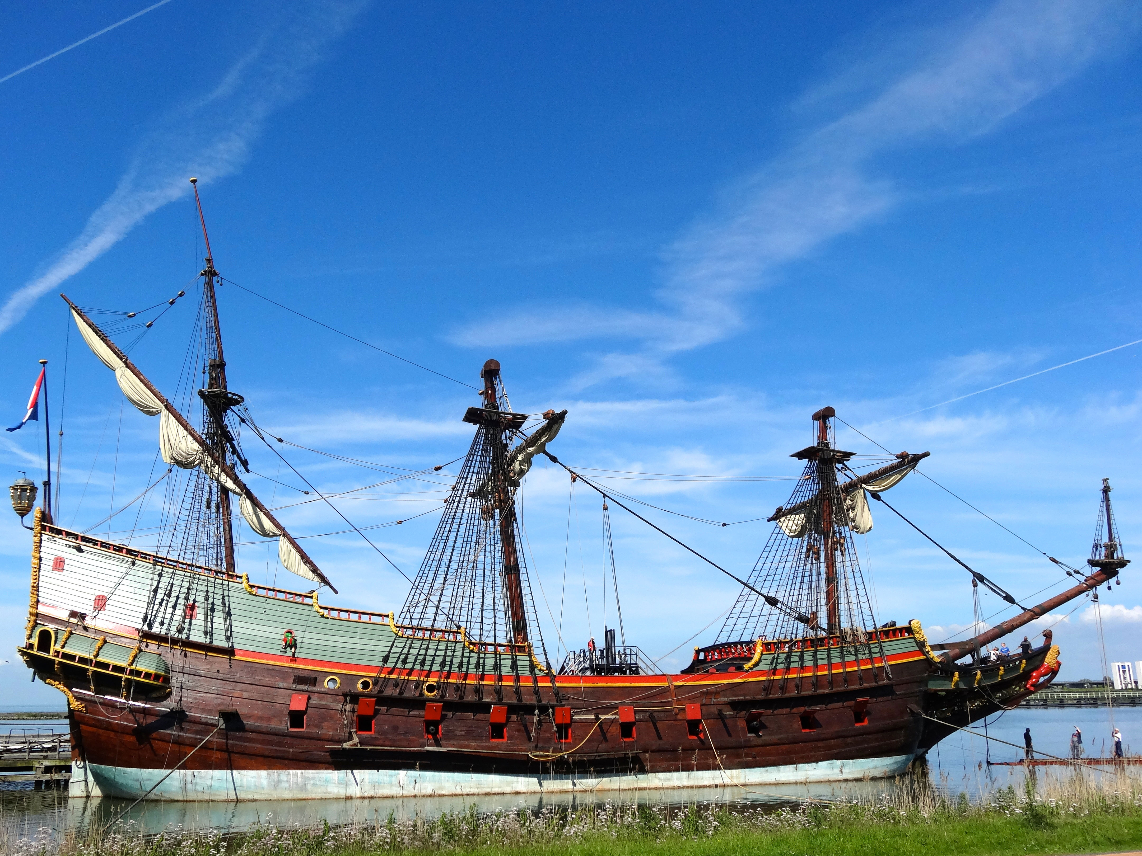 Replica van het VOC-schip de Batavia, Bataviawerf, Lelystad